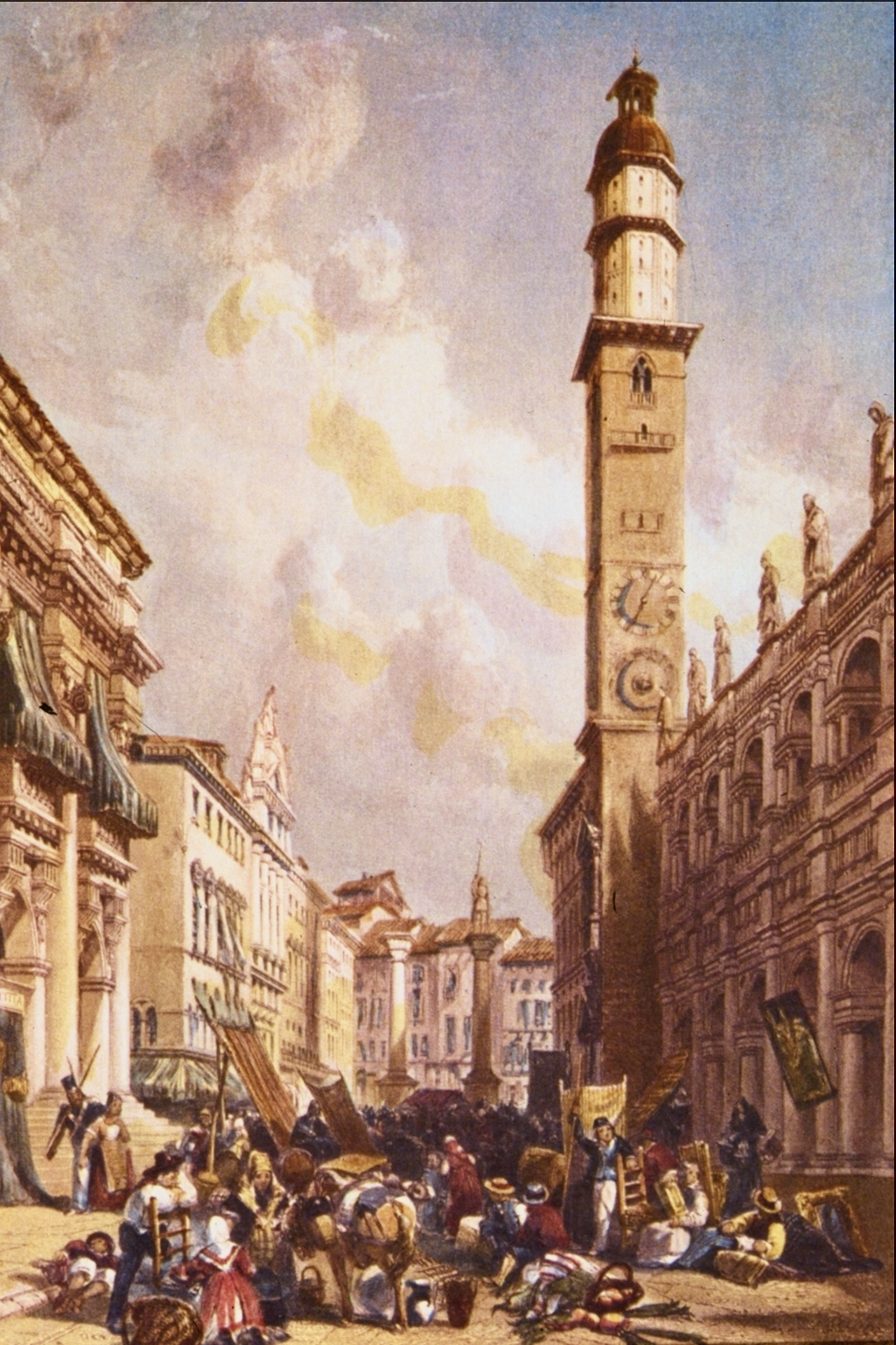 Vicenza